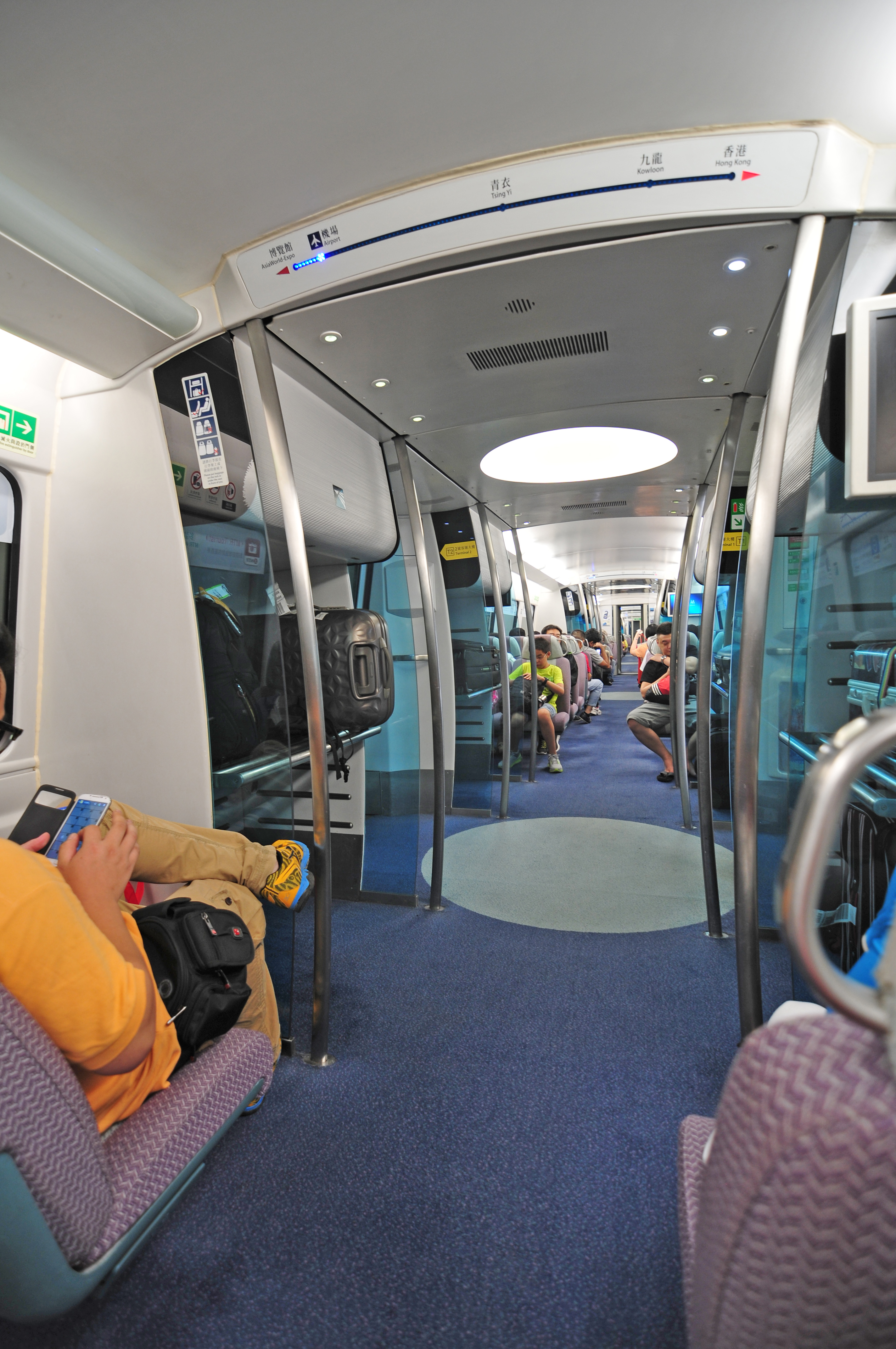 Wikimania 2013 Hongkong